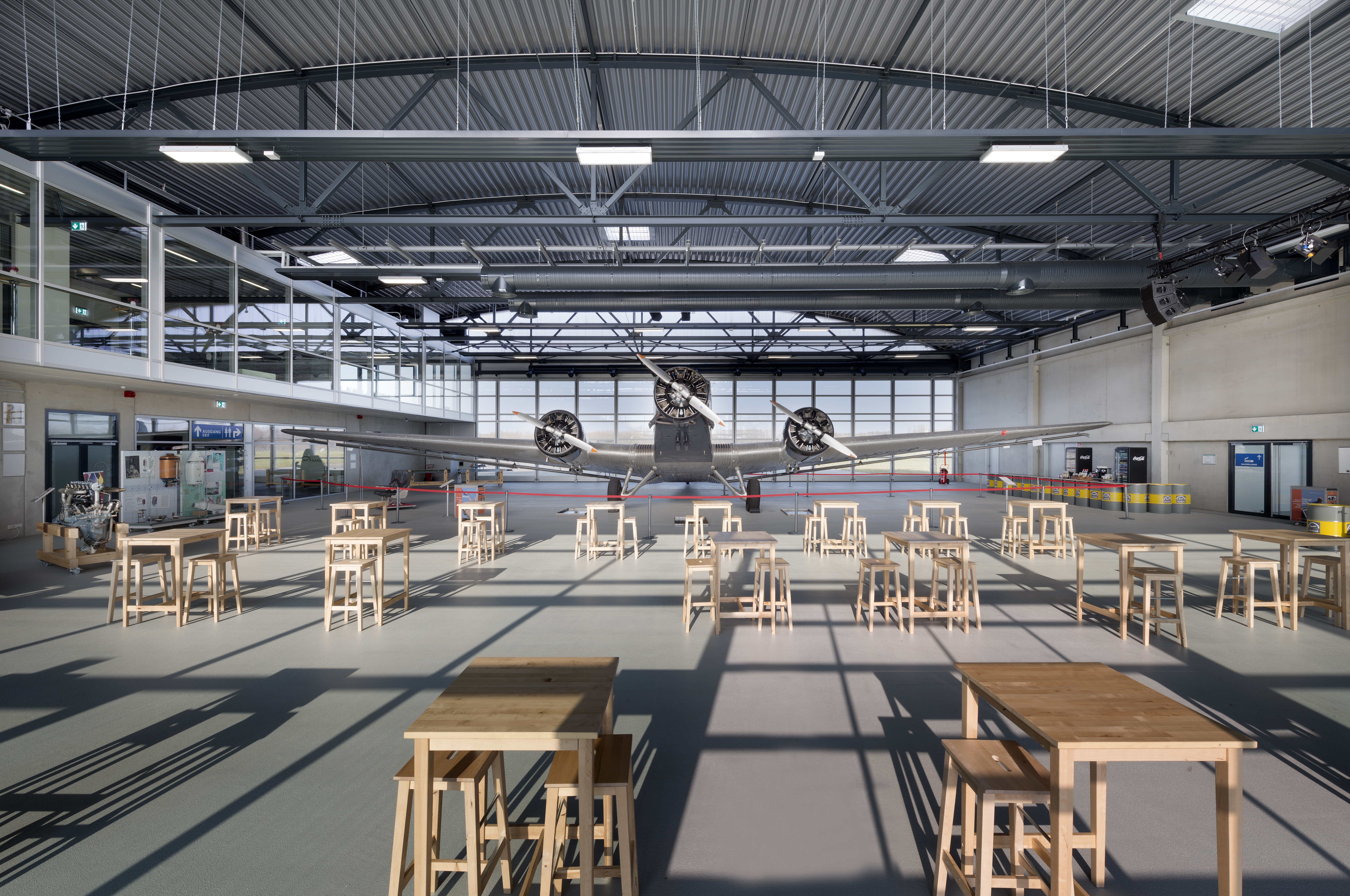 Event Hangar in Mönchengladbach